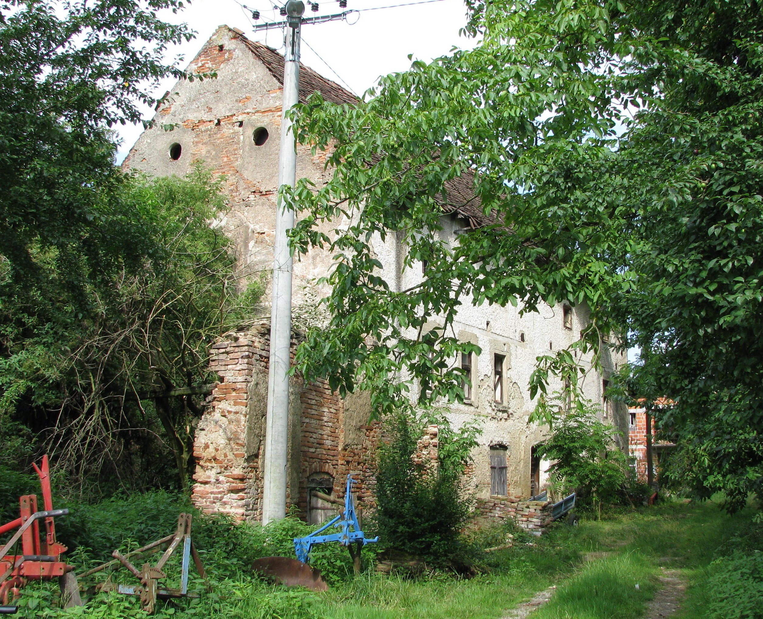 Stari grad Bisag, gospodarska zgrada